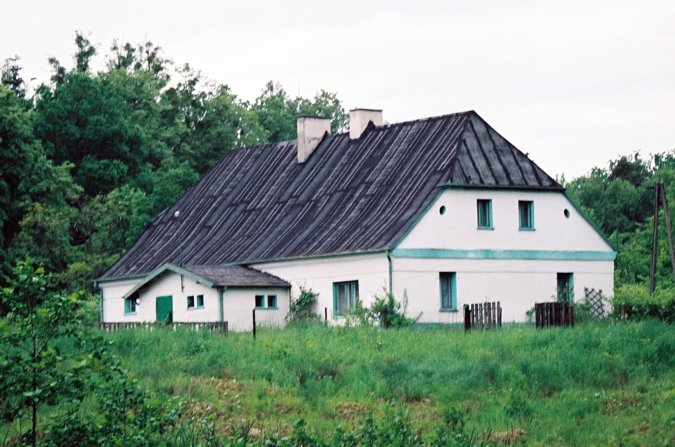 Budynek dawnej leśniczówki w miejscowości Cielec (gmina Boronów, powiat lubliniecki, woj. śląskie)